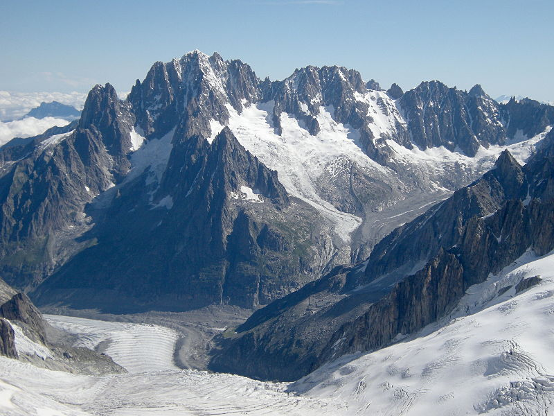 Drus, aiguille Verte, Droites, Courtes et arête des ecclésiastiques (avec l'aiguille du Moine) vus du sud-ouest